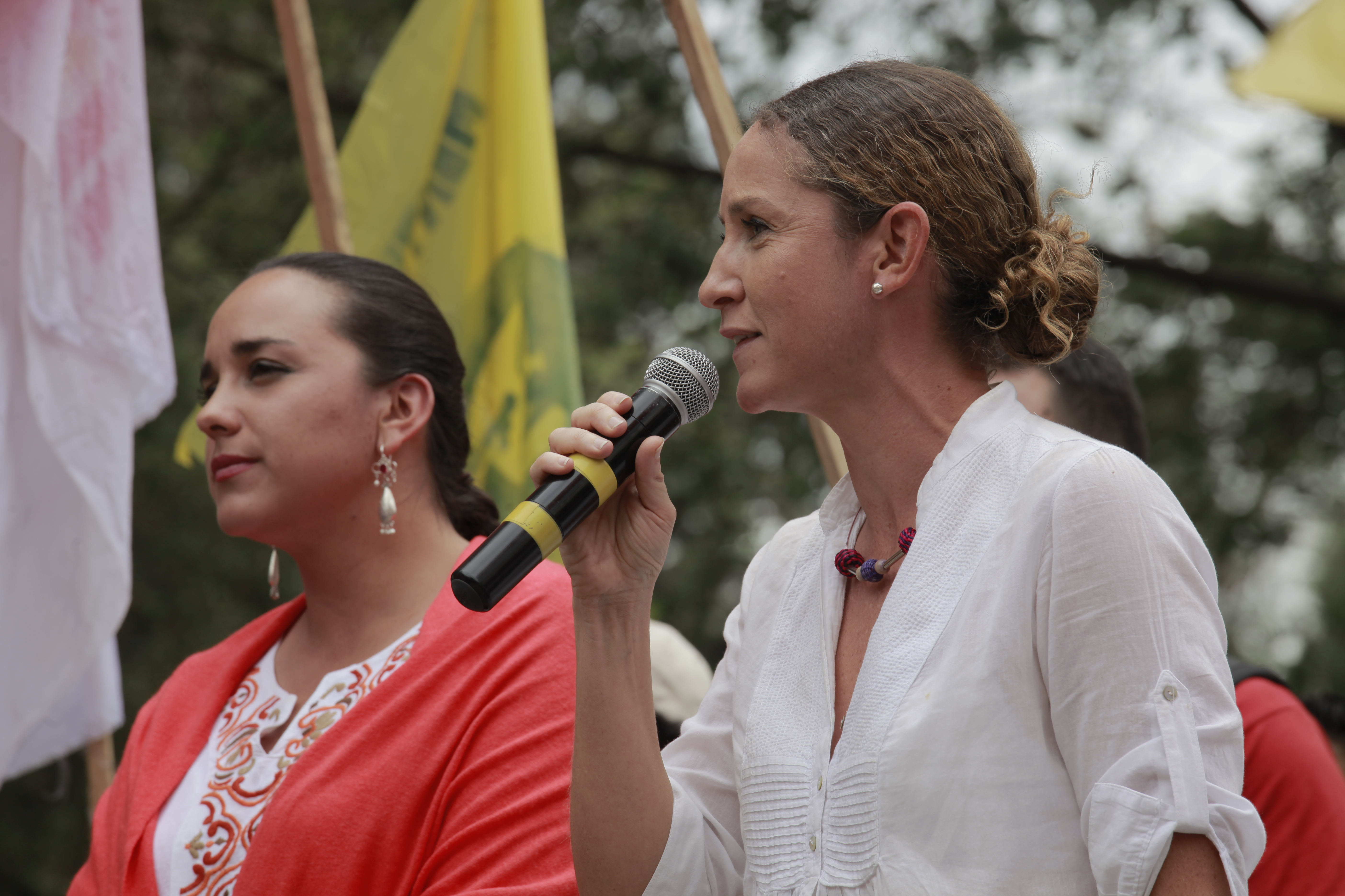 Presidenta de Congreso Gabriela Rivadeneira recibe el Manifiesto del Pacto Montonero en el parque El Ejido. Fotografía: Alberto Romo/Asamblea Nacional